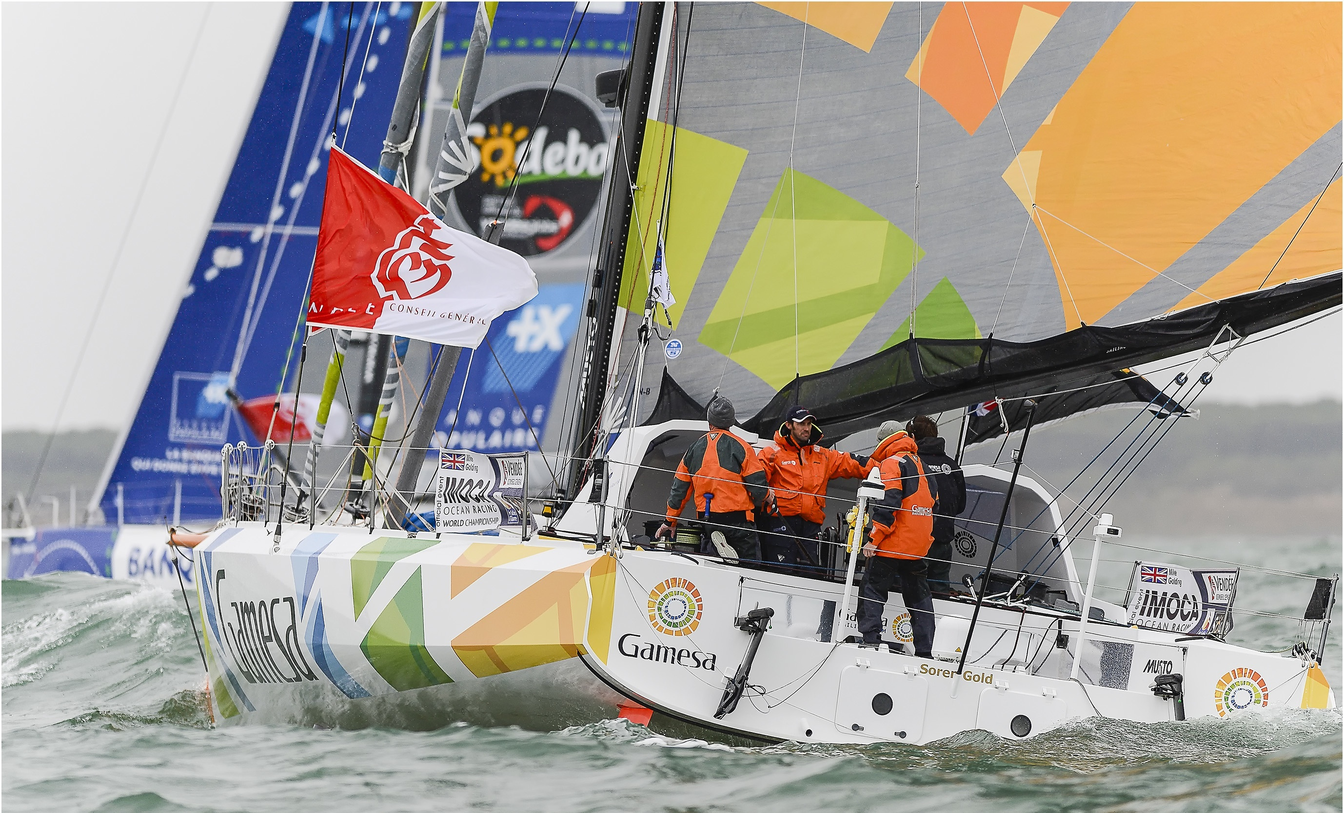 0364-Vendée 2012 (Départ)